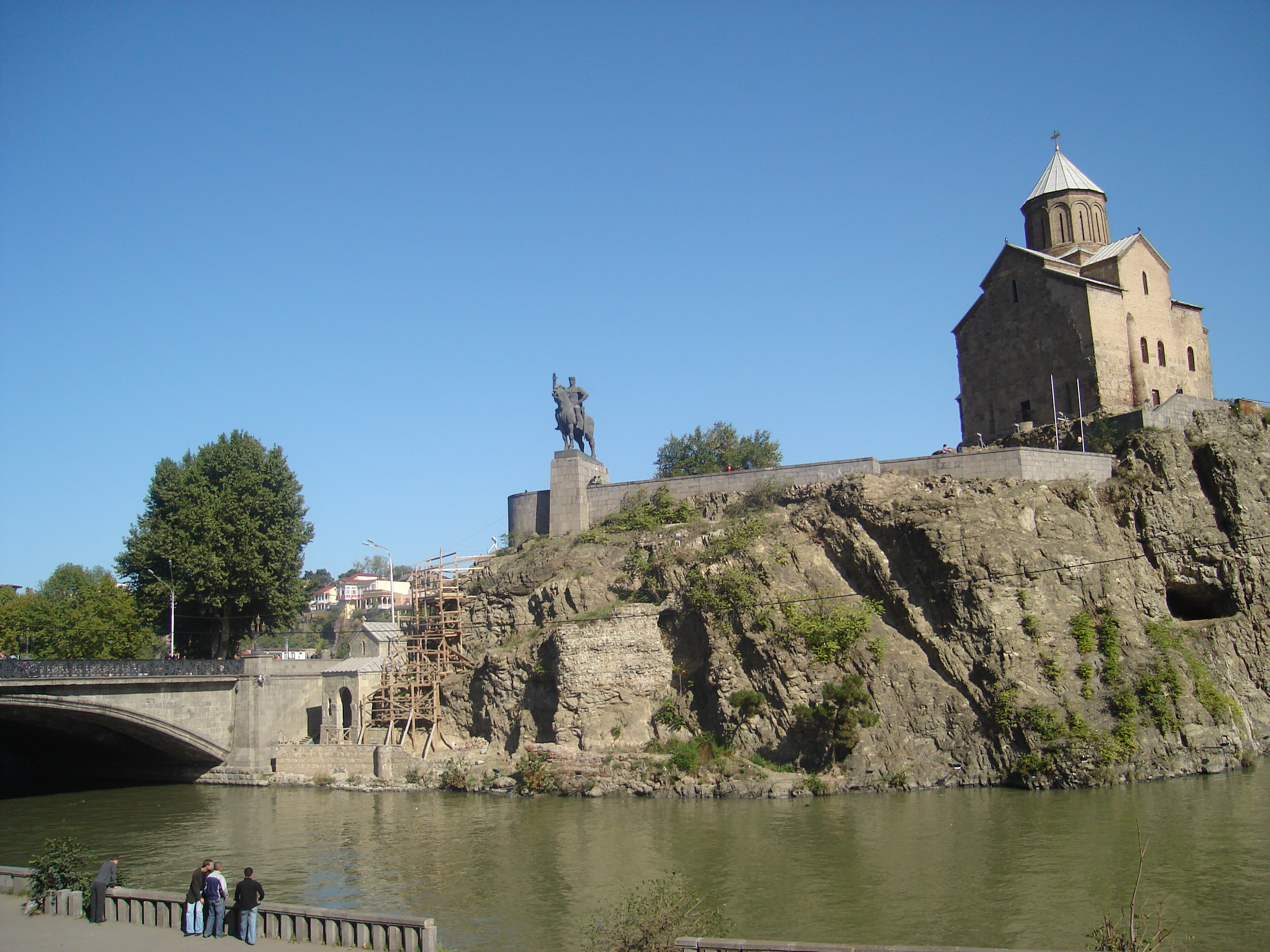 Metekhi Cliff